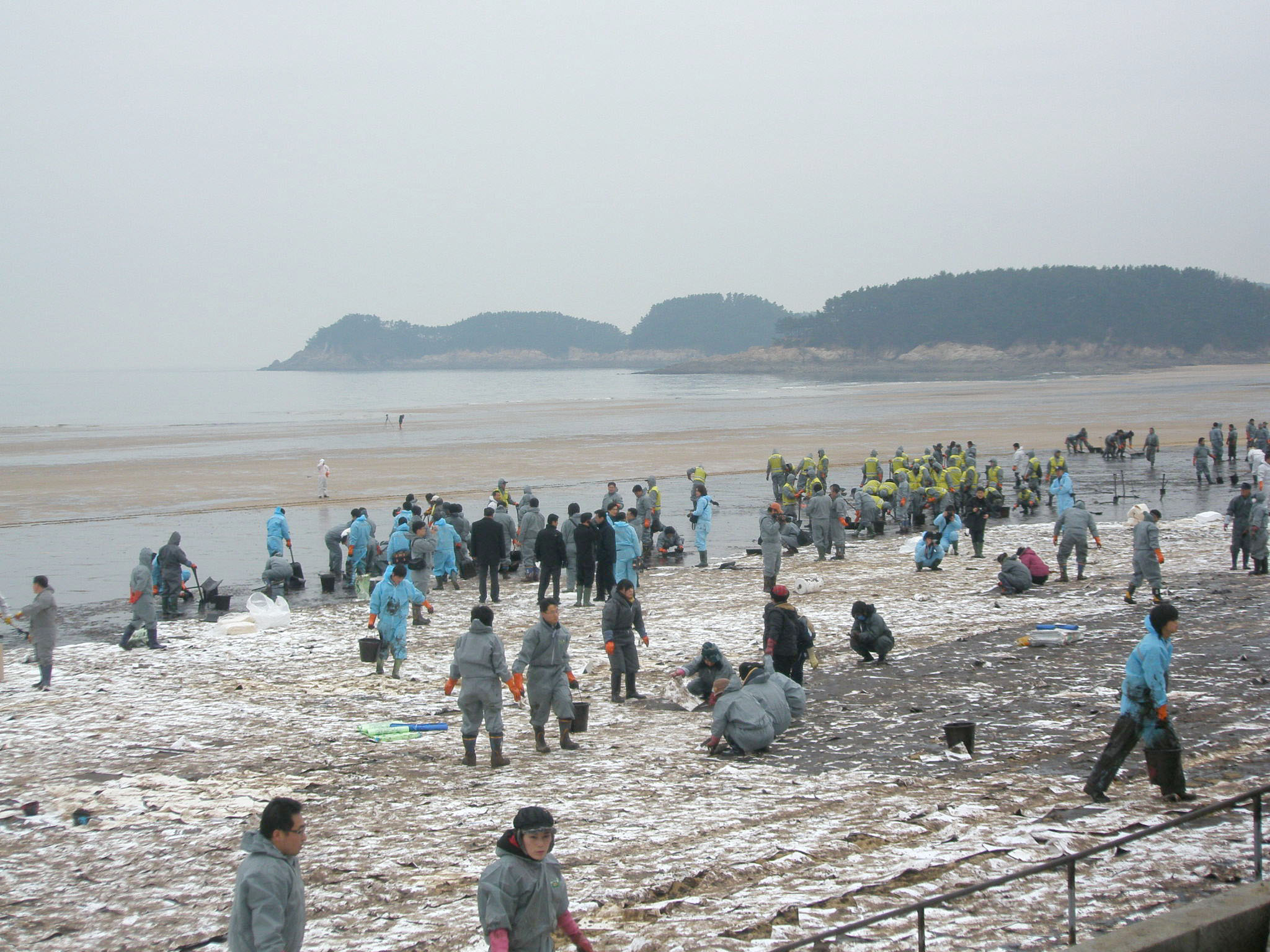 태안 원유 유출 사고 후 만리포 해수욕장. 자원봉사자들이 기름을 제거하고 있다.